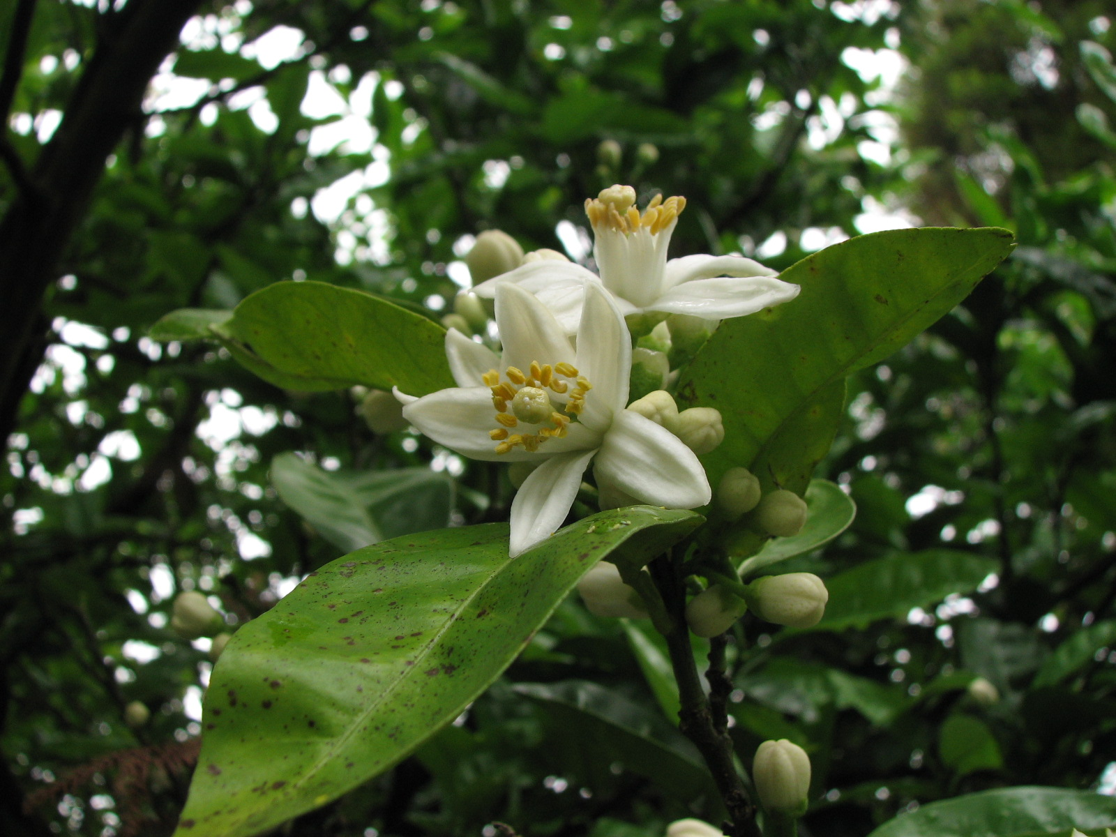 Citrus natsudaidai flower and leaves(Citrus Melanose):ナツミカンの黒点病に罹患した葉と花